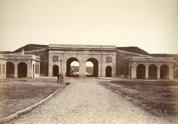 Lille : Porte de Valenciennes. Nouvelle enceinte. Date : 1870-1875. Dimensions : 25 x 35 cm. Technique : Photographie. Épreuve sur papier albuminé d'après négatif sur verre au collodion